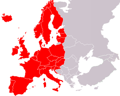 Karta över västeuropa, kulurellt sett